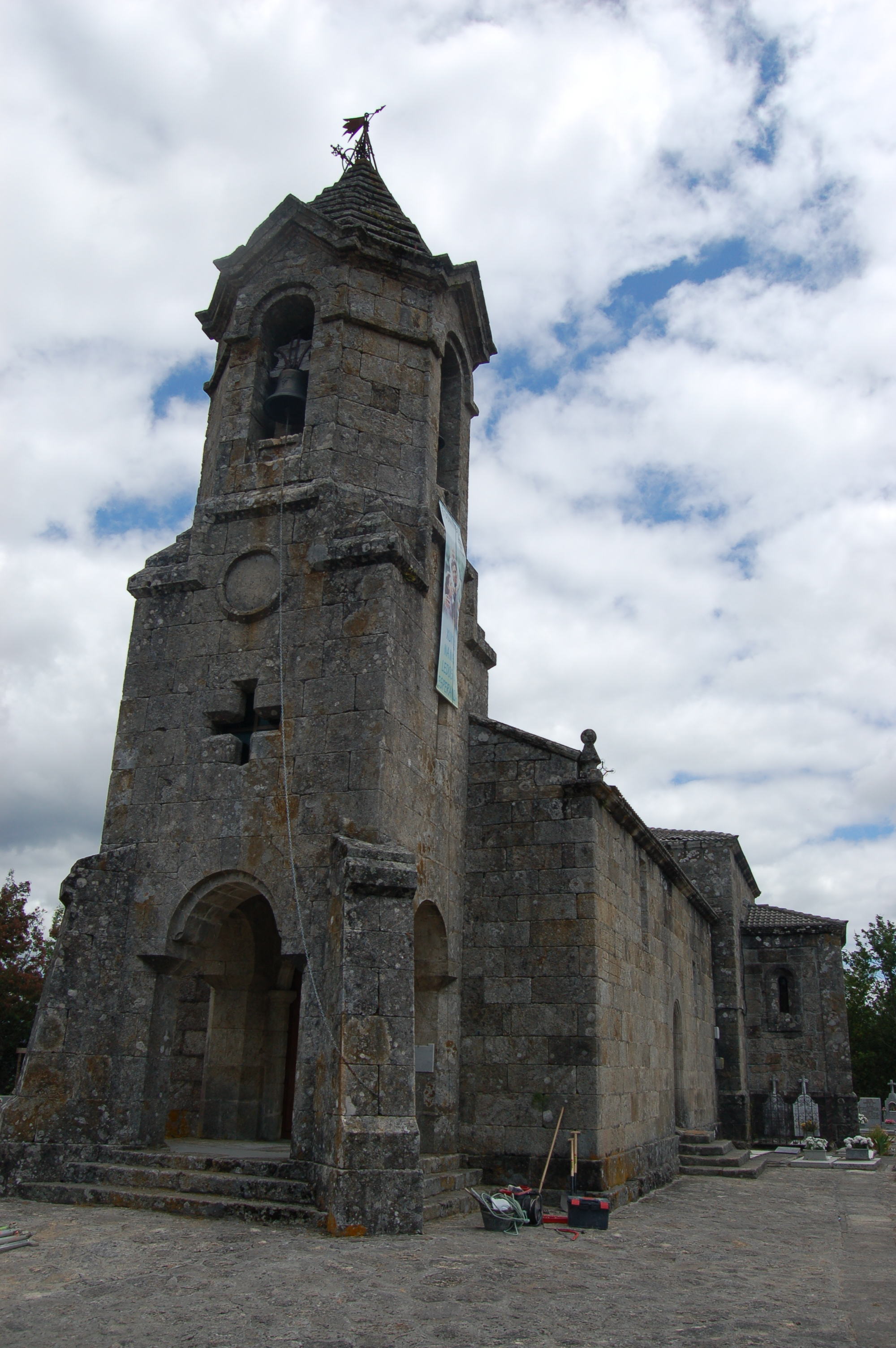 Fachada oeste da igrexa parroquial de San Pedro de Muíños